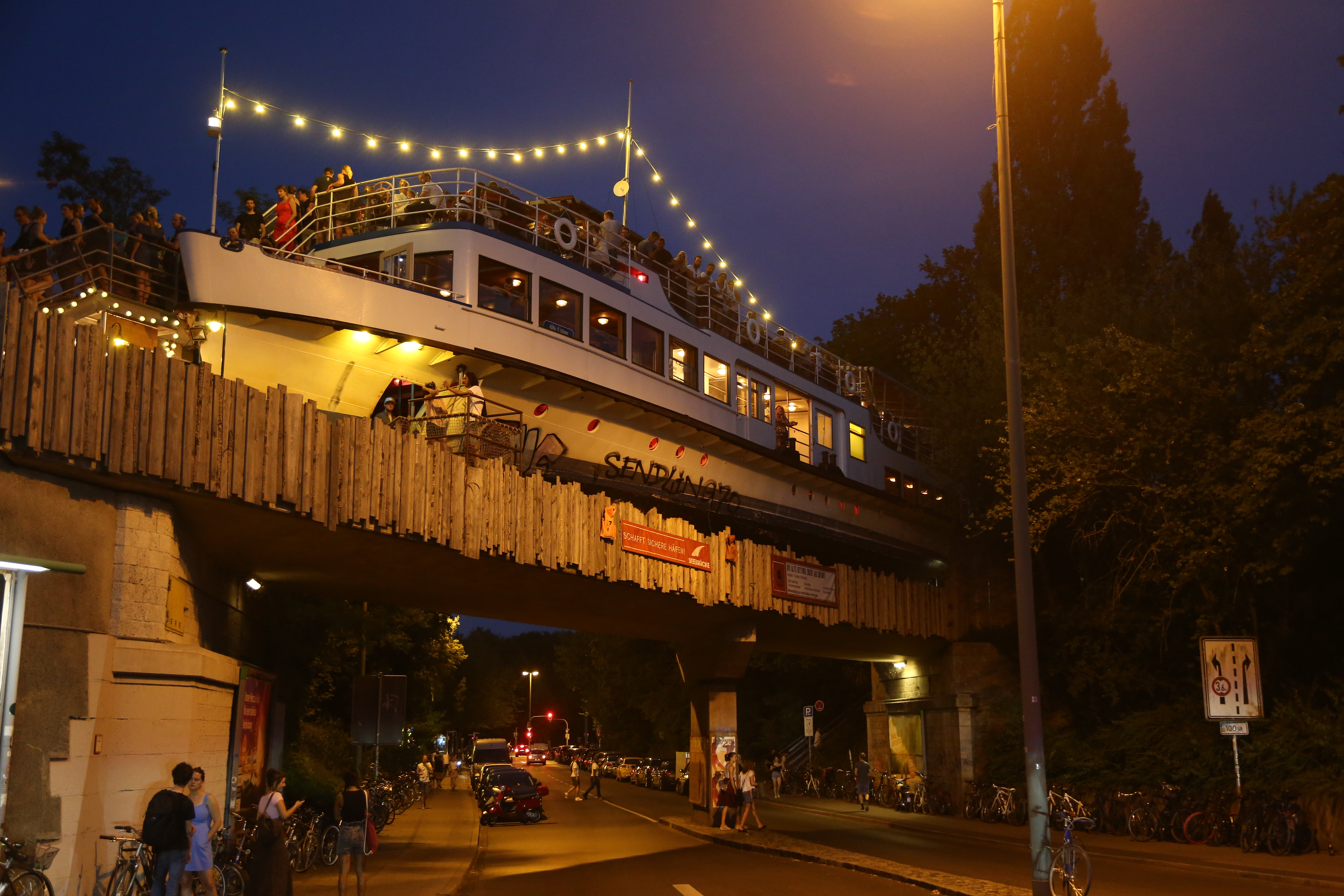 Die Alte Utting. Erst Ausflugsschiff Baujahr 1950 auf dem Ammersee. Seit Juli 2018 Kulturlocation in München-Sendling.